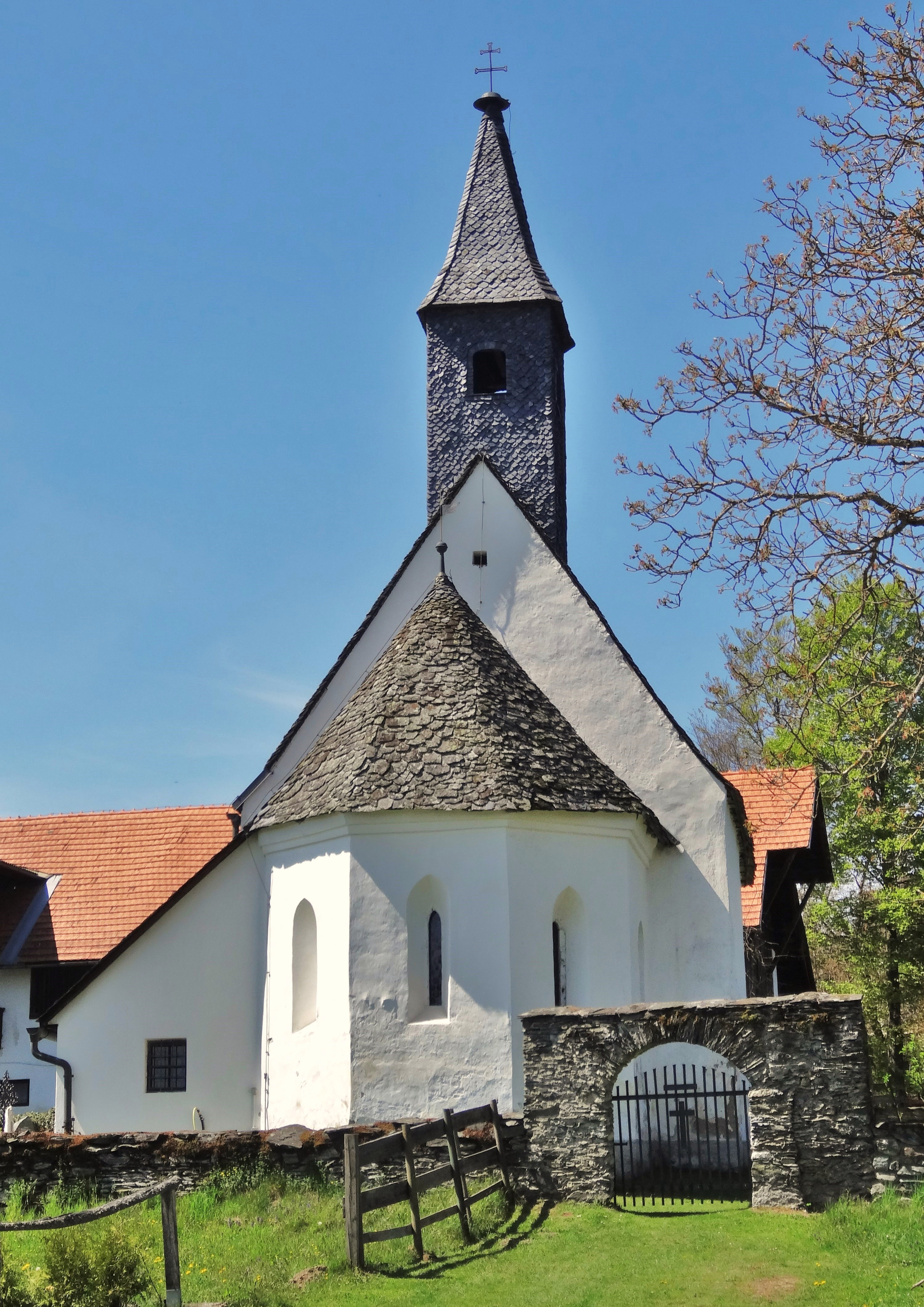 Kath. Filialkirche hll. Philippus und Jakobus und Friedhof, Ansicht von Osten